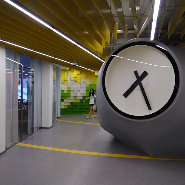 Фрагмент петербургского офиса "Яндекса"